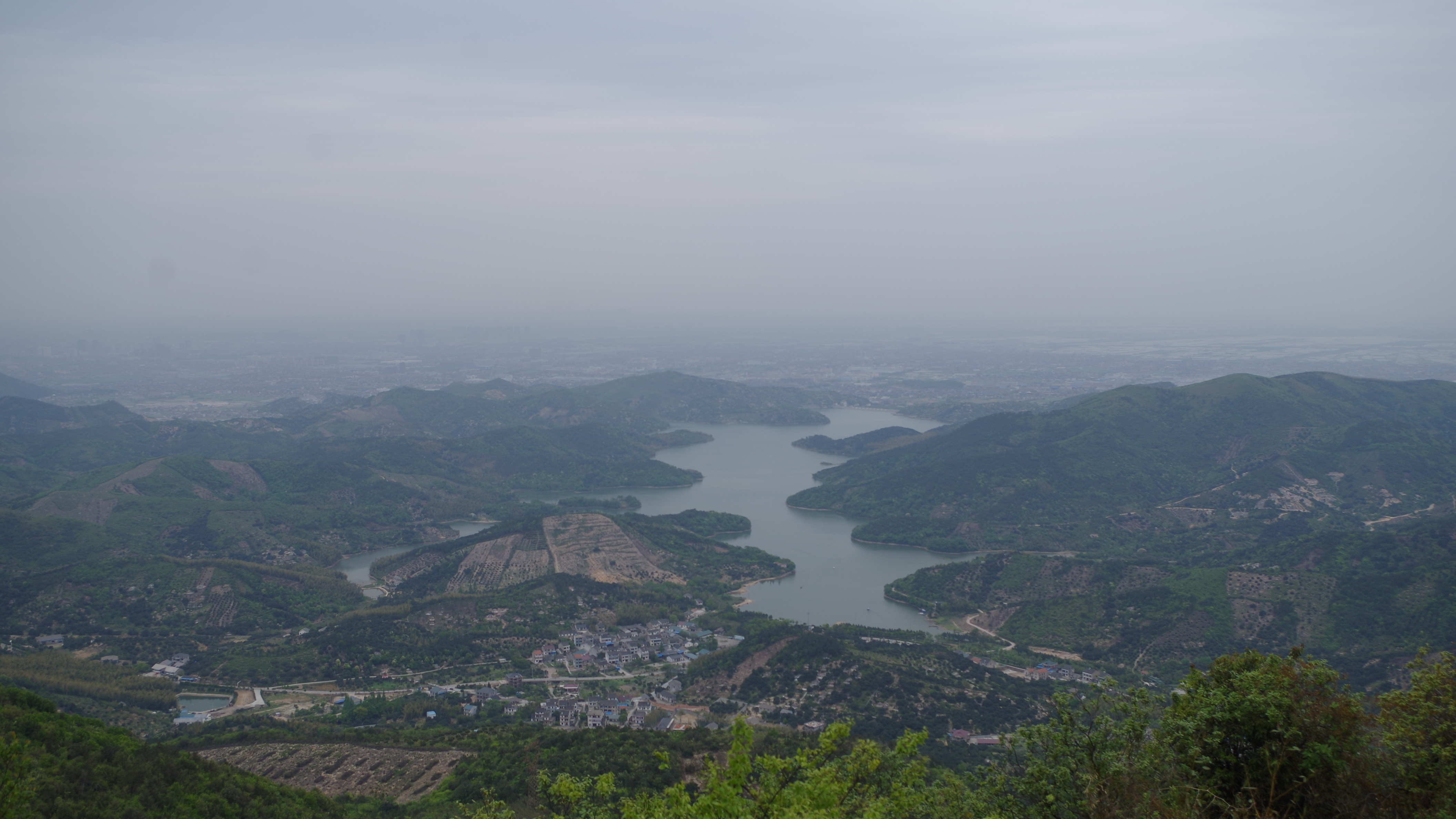 Cixi, Ningbo, Zhejiang, China